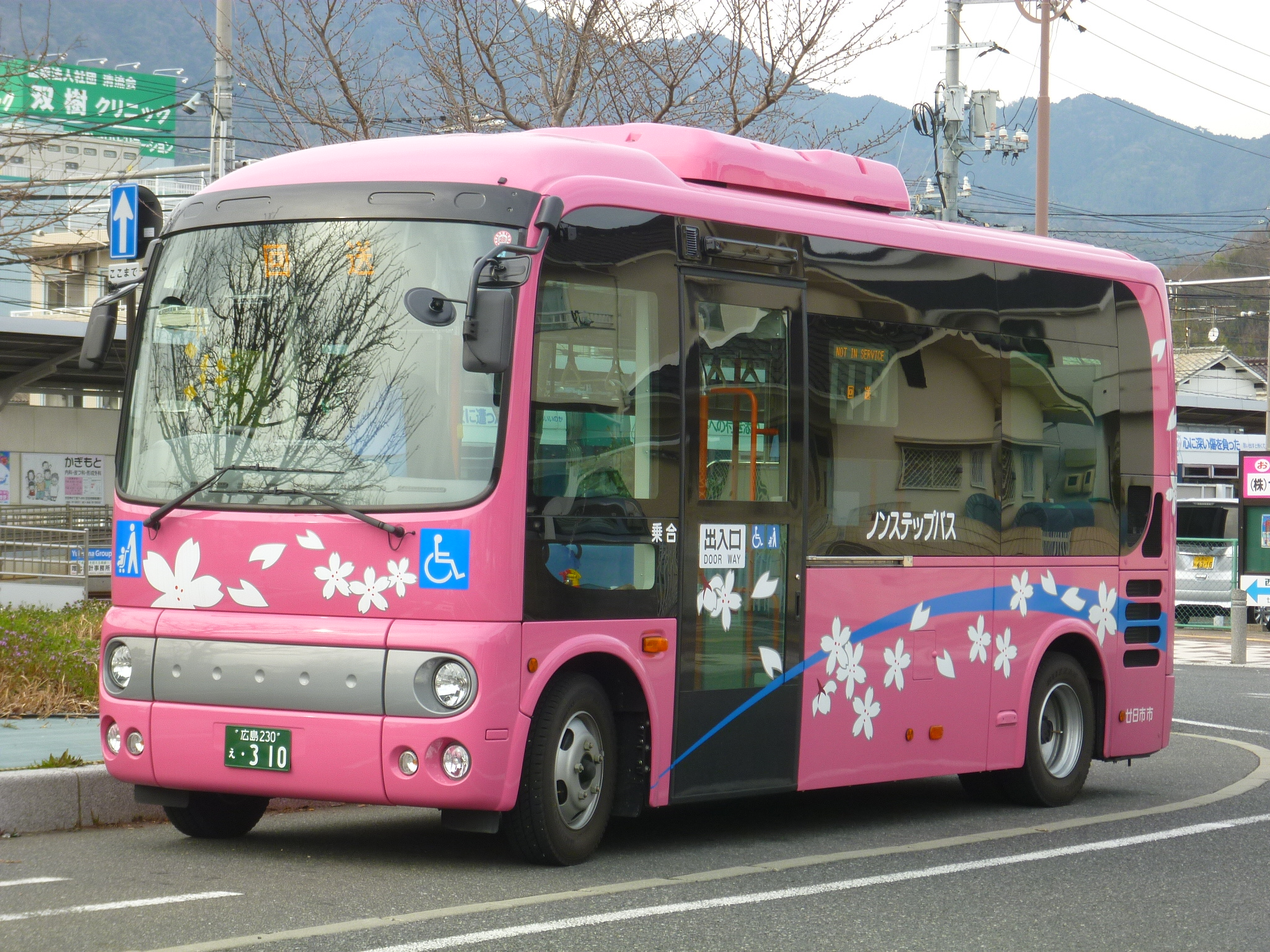 広電バス「廿日市さくらバス」専用車両